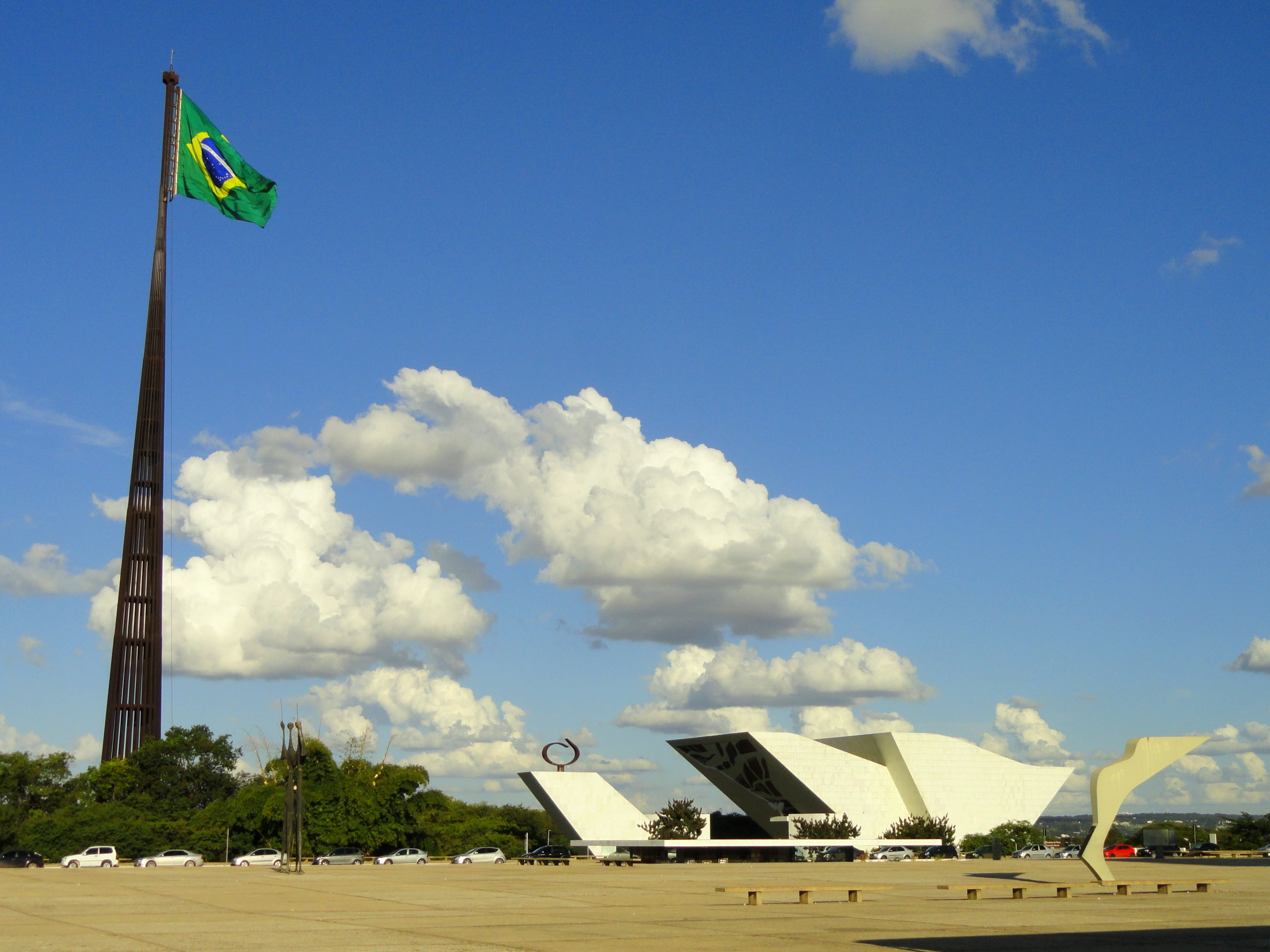 Praça dos Três Poderes, Brasília, Brazil.